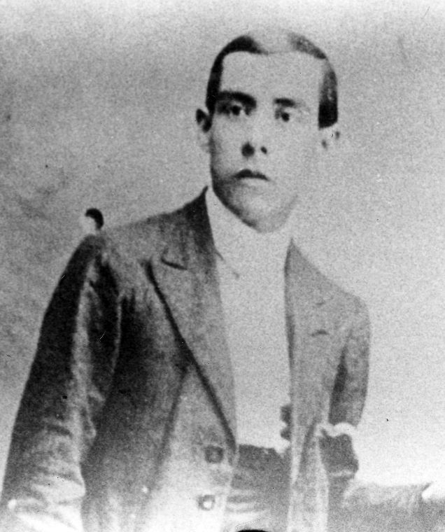 Julio Felipe Federico Pinglo Alva (Lima, Perú; 18 de julio de 1899 - 13 de mayo de 1936), conocido como «el bardo inmortal», fue un destacado compositor peruano, considerado uno de los máximos exponentes de la música criolla, poseedor de un estilo de amplio arraigo popular que enriqueció el acervo musical peruano. Es también conocido internacionalmente por ser el autor del vals «El plebeyo».